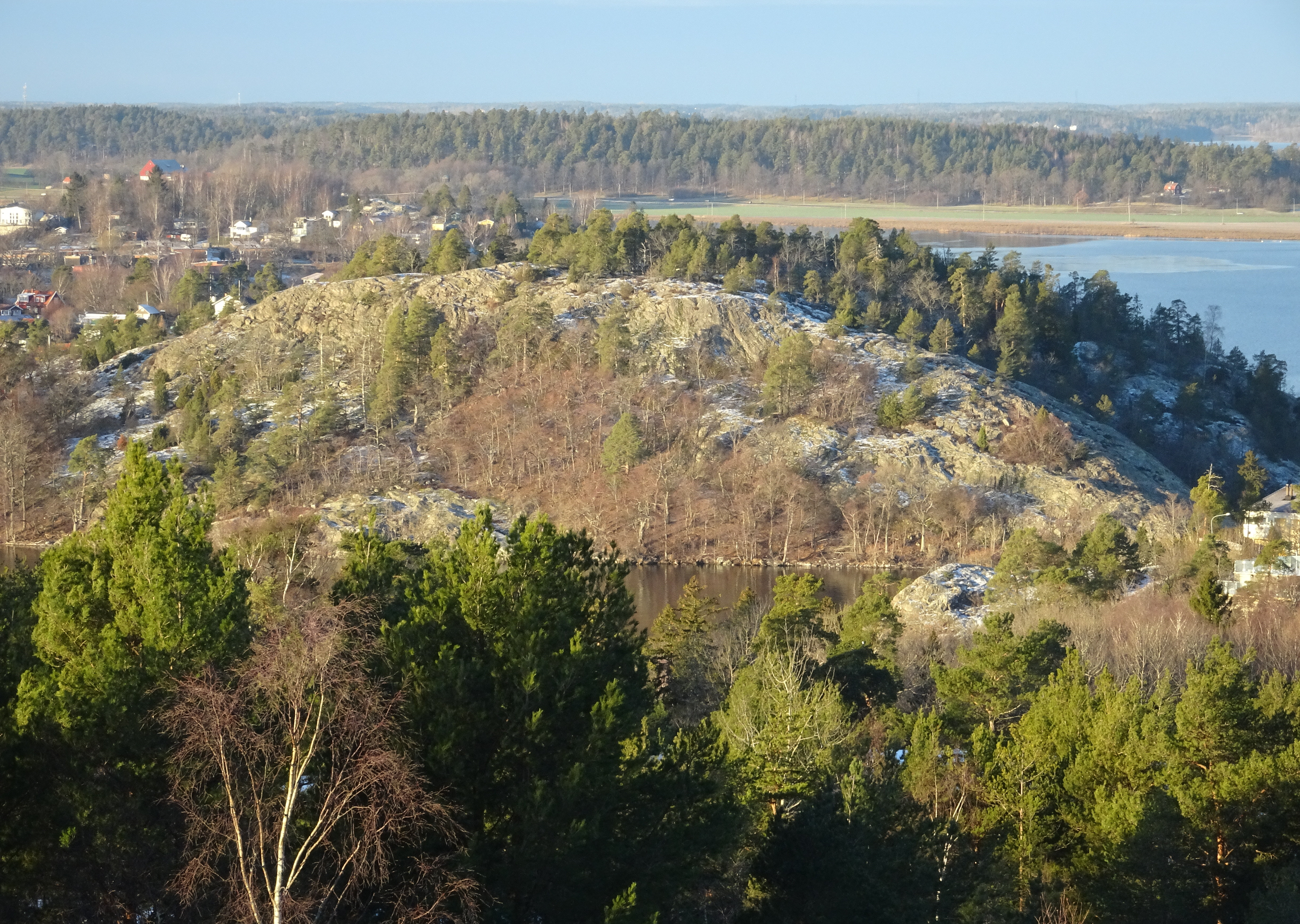 Vikingaberget, utsikt över Estbröte